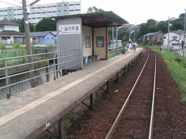 泉福寺駅 投稿者が撮影(2006/08/28)